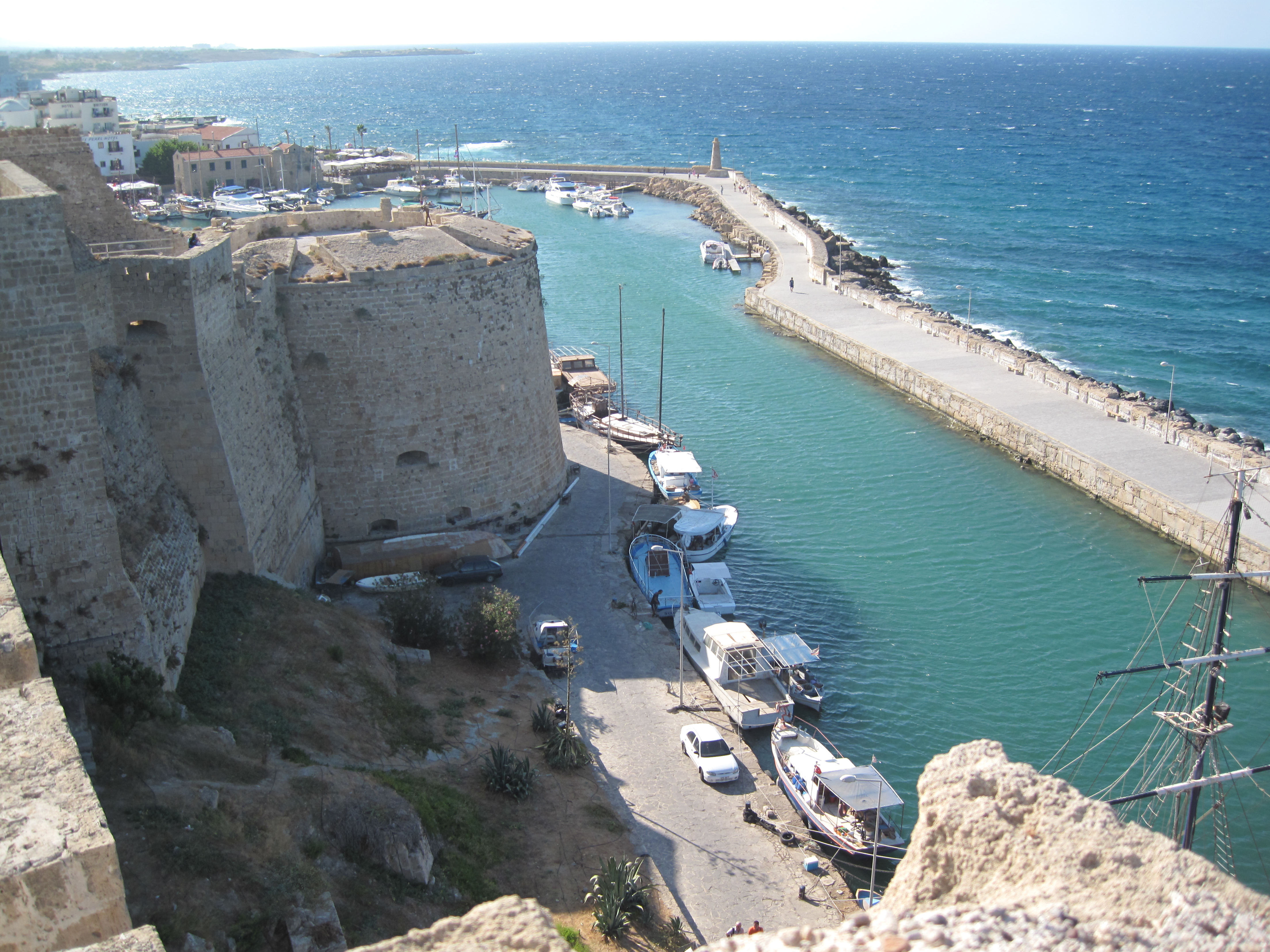 Kyrenia kasteel en haven